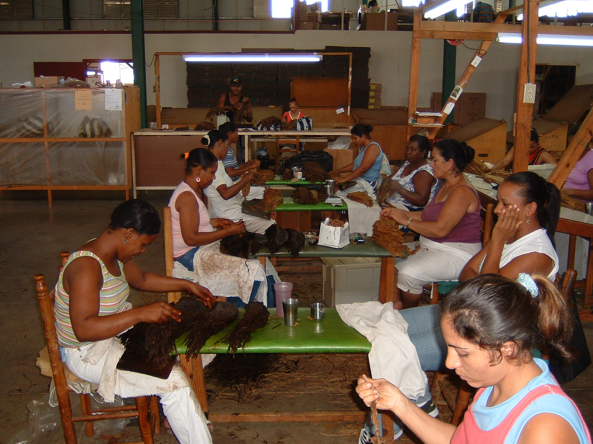 Herstellung von Zigarren in der Dominikanischen Republik, Santiago